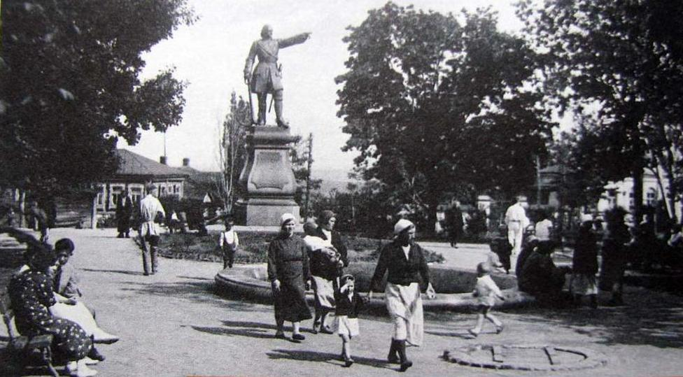 Памятник Петру I и Петровский сквер в Воронеже в 1920-е годы